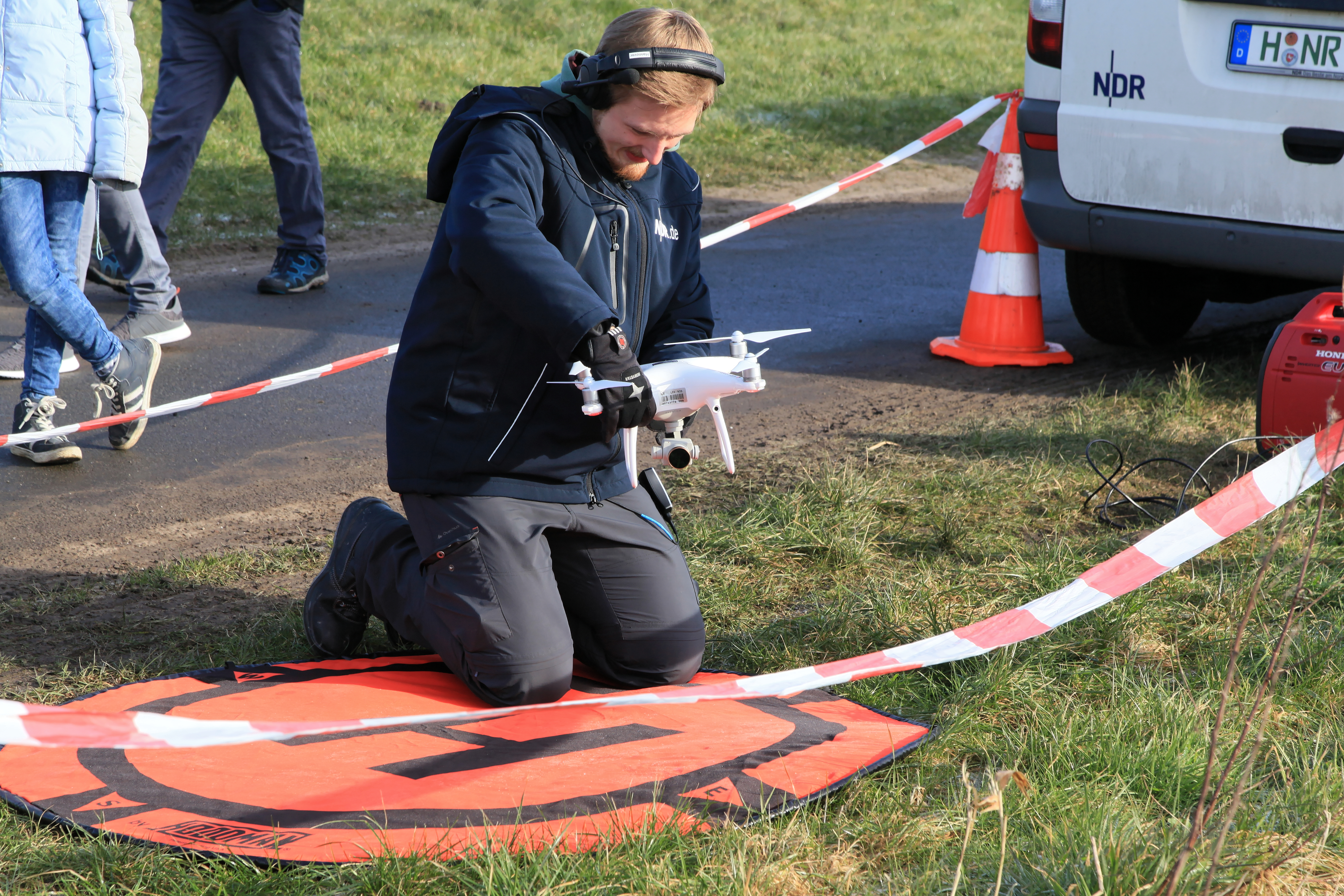 Undocking of the Norwegian Bliss at the Meyer Werft in Papenburg